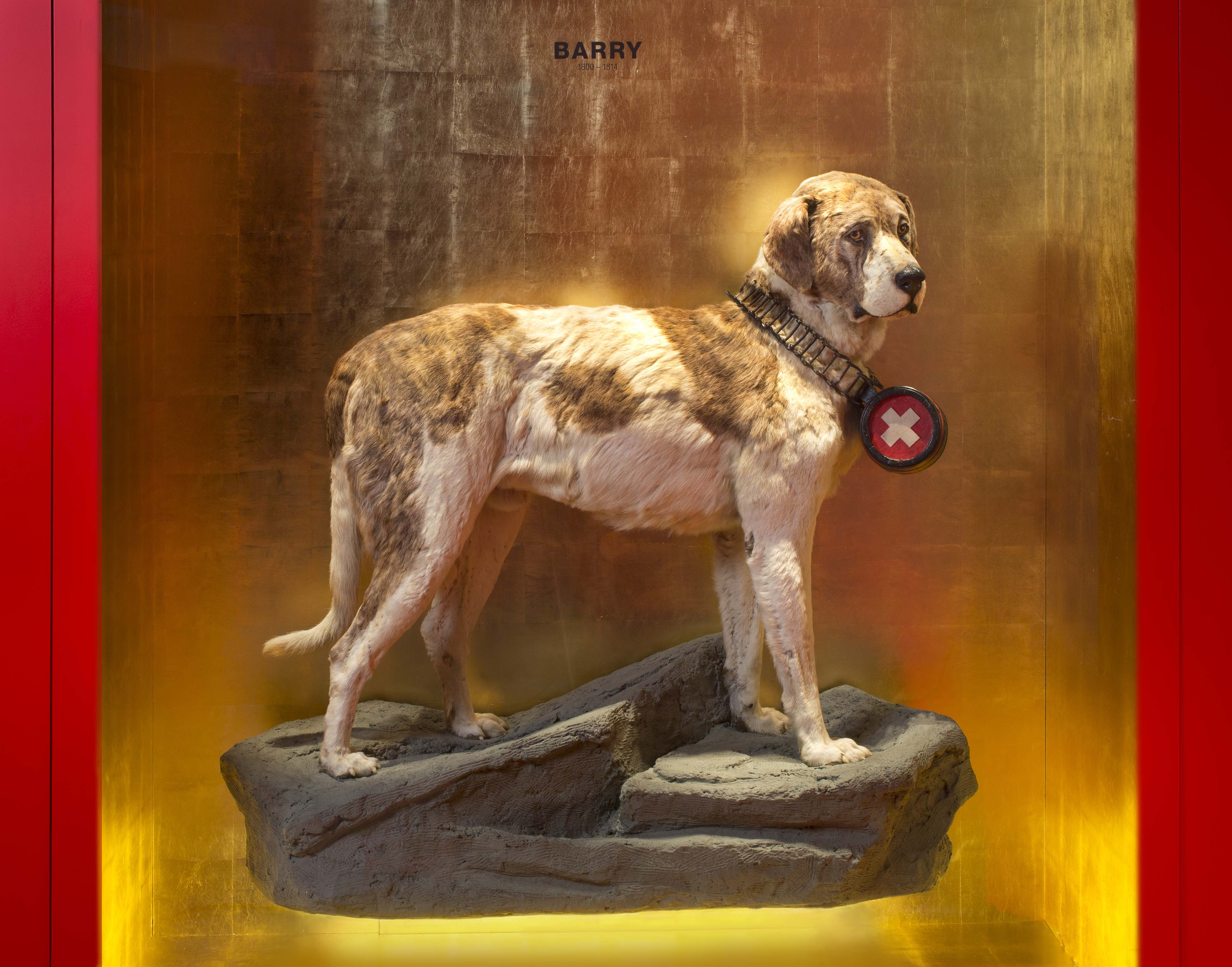 Der berühmte Bernhardiner Rettungshund Barry als Exponat im Naturhistorischen Museum Bern